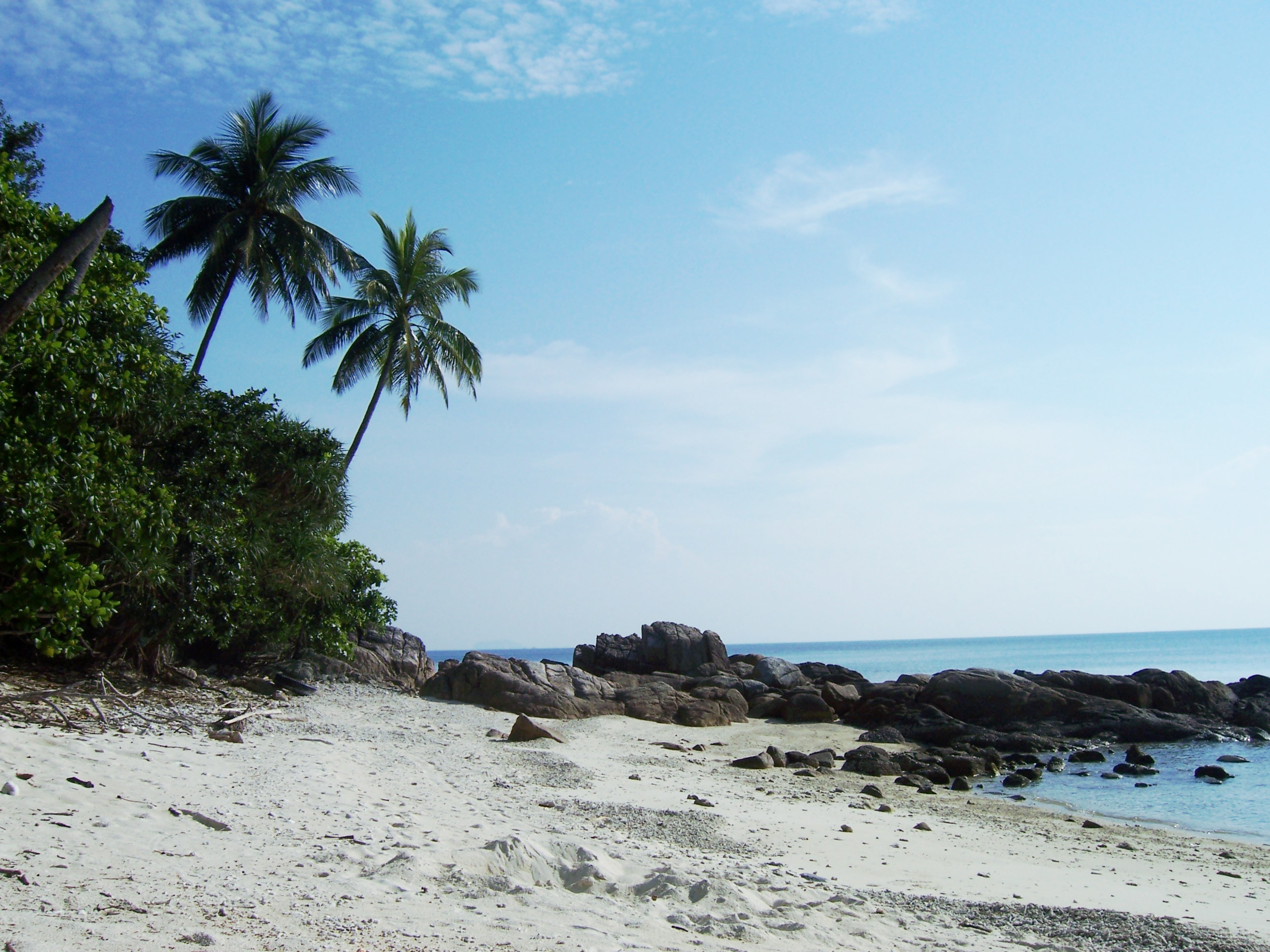 Perhentian Kecil beach, Perhentian Islands, Malaysia